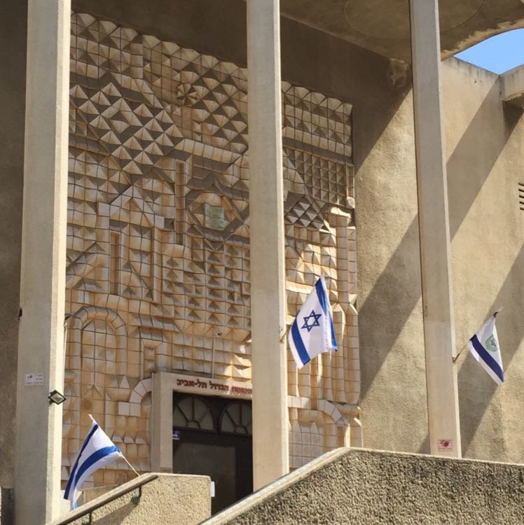 Gran Sinagoga nel númberu 110 de la cai Allenby, na ciudá de Tel Aviv.